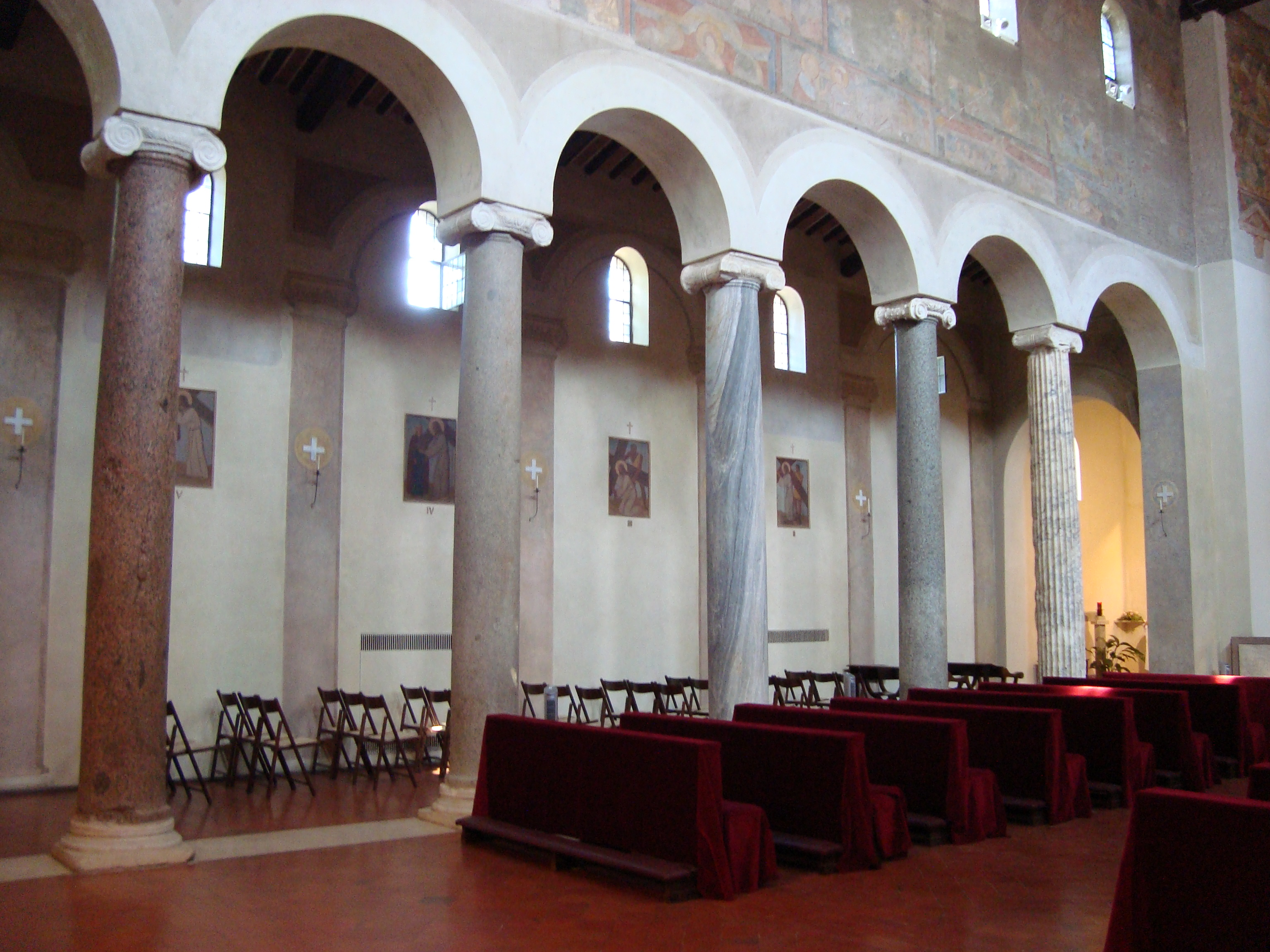 Les colonnes de la nef de l'Église San Giovanni a Porta Latina de Rome